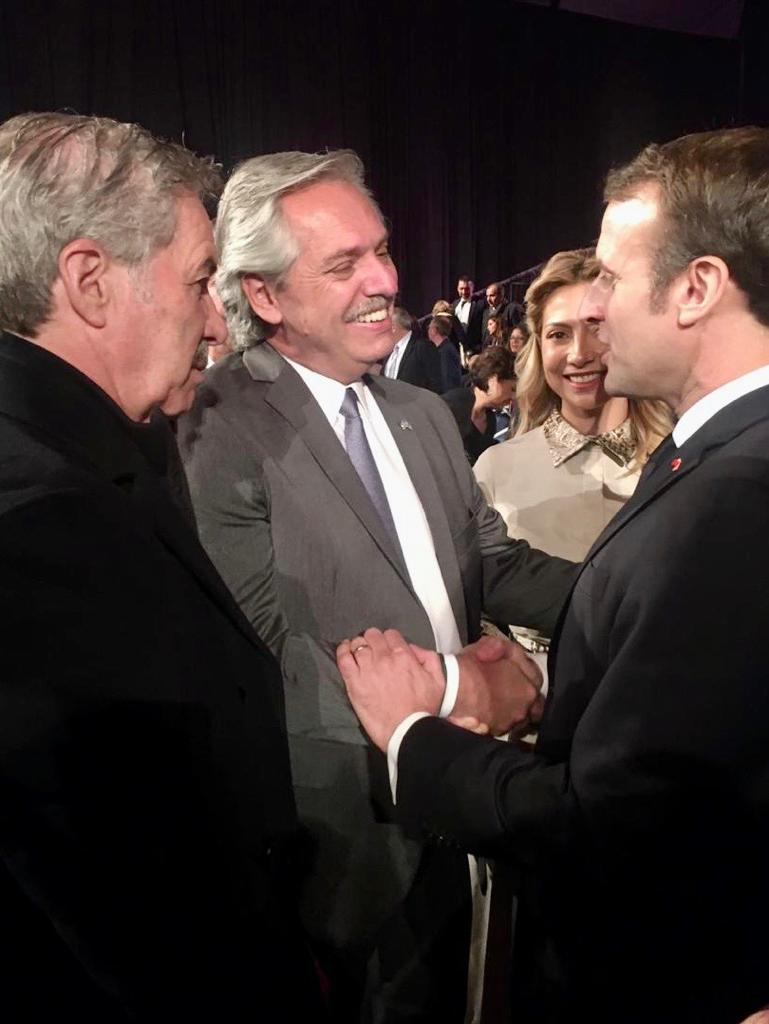 El presidente Alberto Fernández participó del V Foro Mundial del Holocausto «Recordando el Holocausto: combatiendo el antisemitismo».